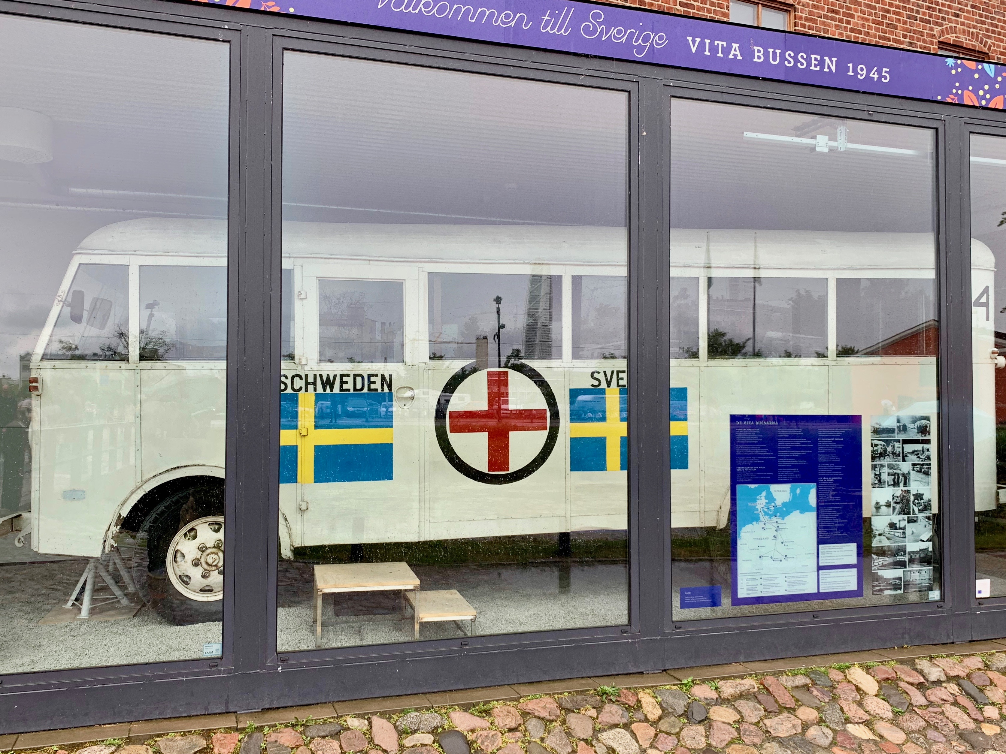 En av de hvite bussene (Buss 44 – cug 530). Kun fem av dem er bevart, dette eksemplaret står hos Malmö Museer.